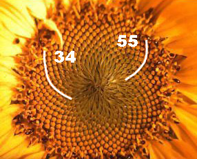 Blütenstand einer Sonnenblume mit 34 und 55 Fibonacci-Spiralen. Mit freundlicher Genehmigung von Doris Haß Spiralen eingezeichnet von Wolfgang Beyer